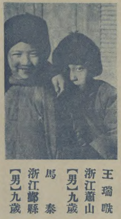 中文（台灣）: 王瑞駪和馬泰